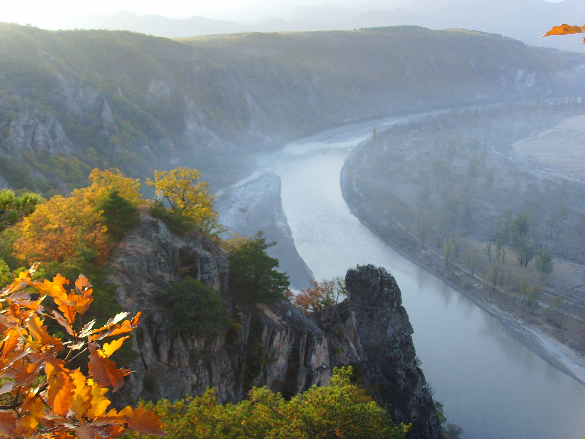 白金烟囱岩--구새바위